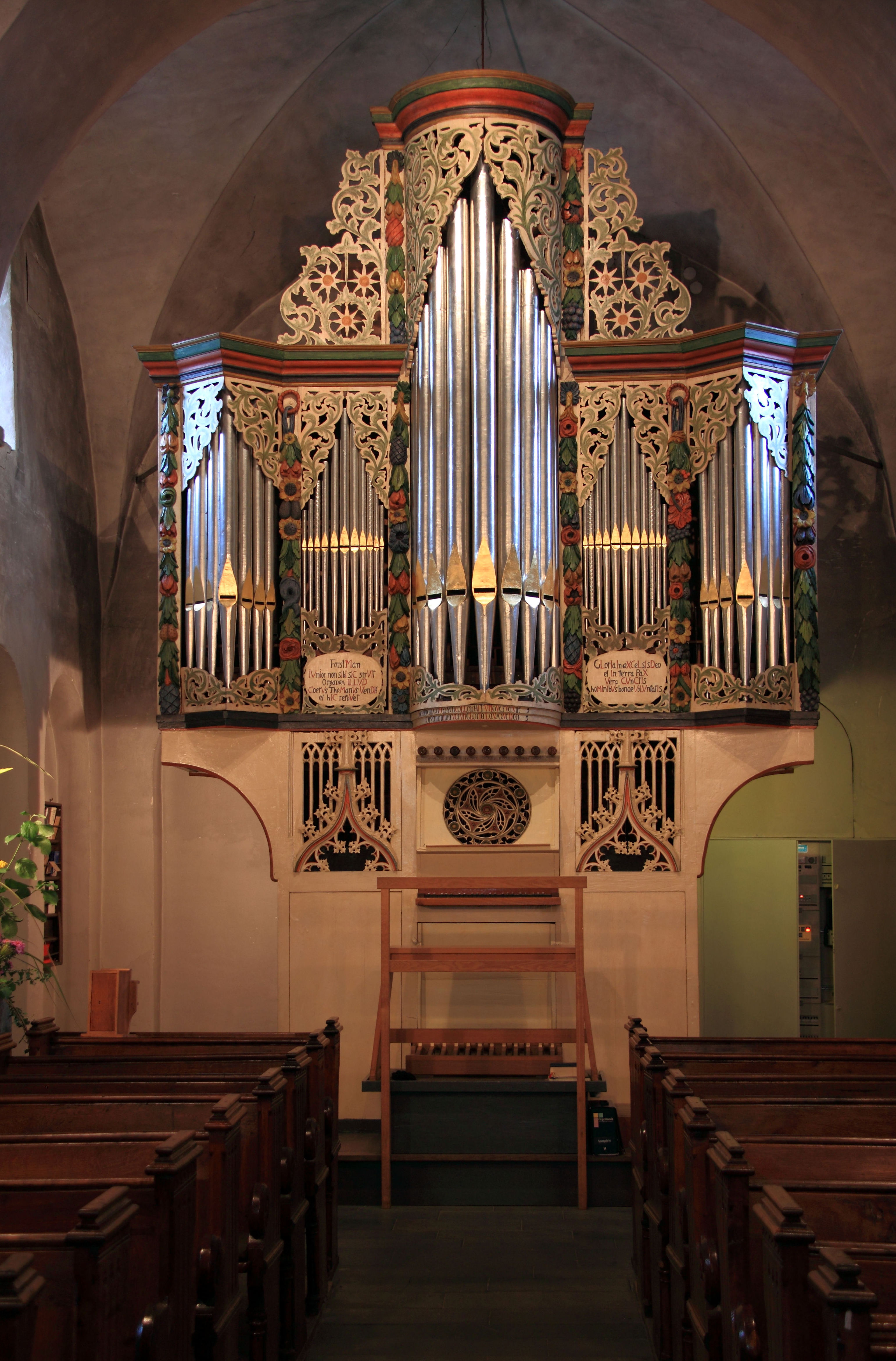 Orgel in St. Andreas Ostönnen, Nordrhein-Westfalen